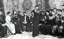 კადრი ფილმიდან :In the Kingdom of Oil and Millions, 1916